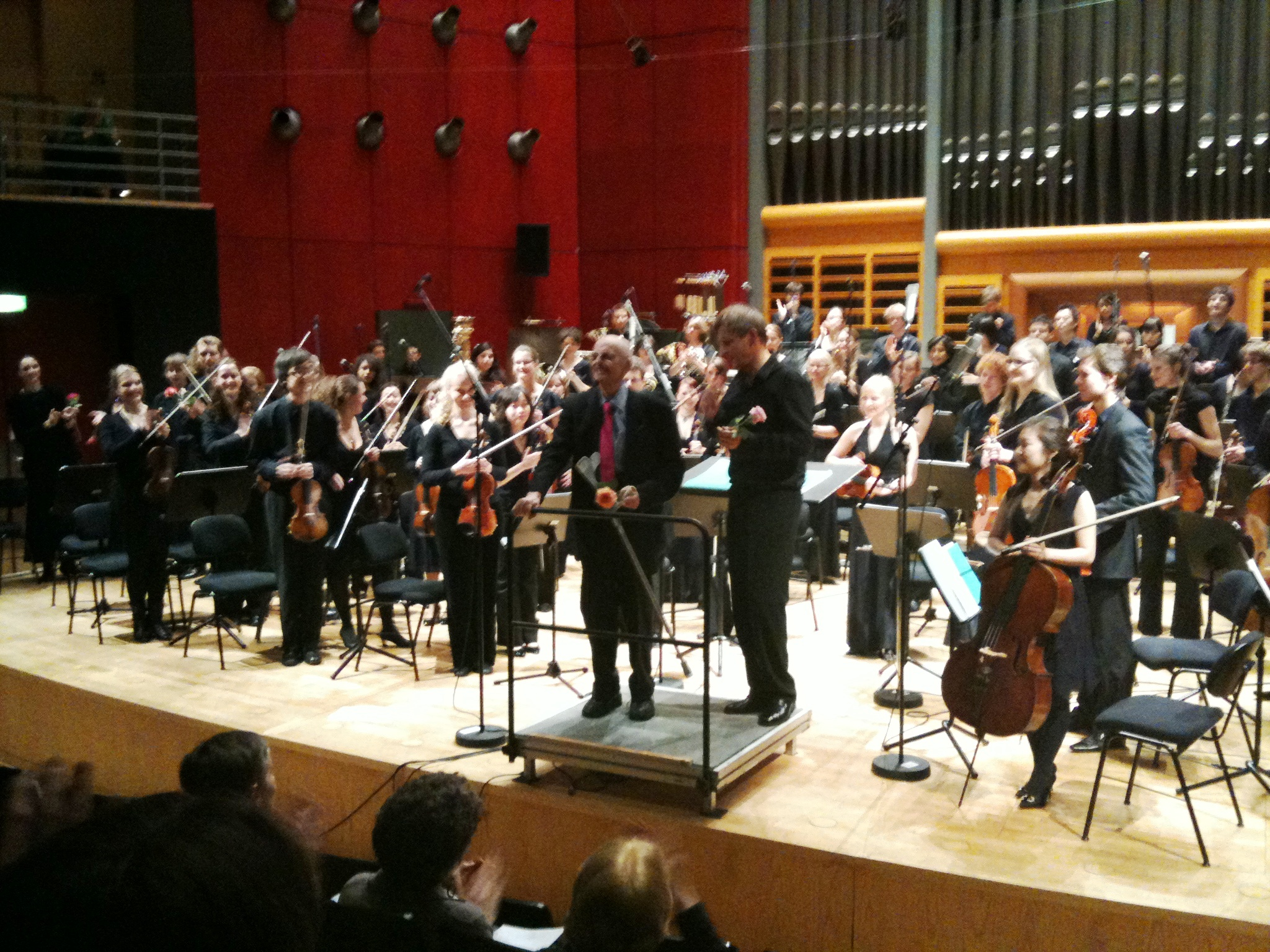 Samstag, 07.11.2009, Konzertsaal der Staatlichen Hochschule für Musik und Darstellende Kunst Stuttgart, Sinfoniekonzert des HSO, Milko Kelemen: Concerto 2000, Uraufführung